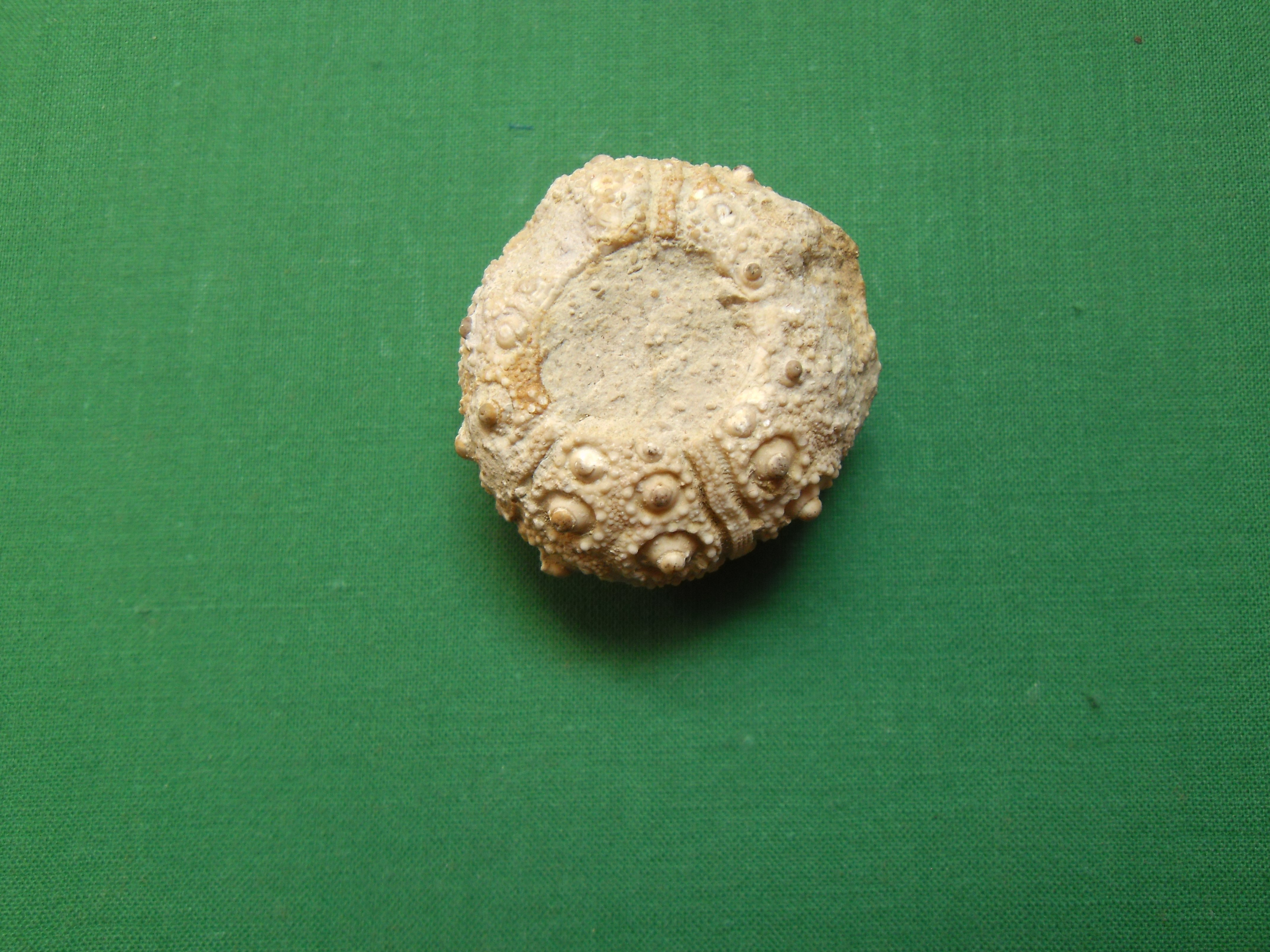 Fossiler Seeigel aus dem Malm, Klettgau